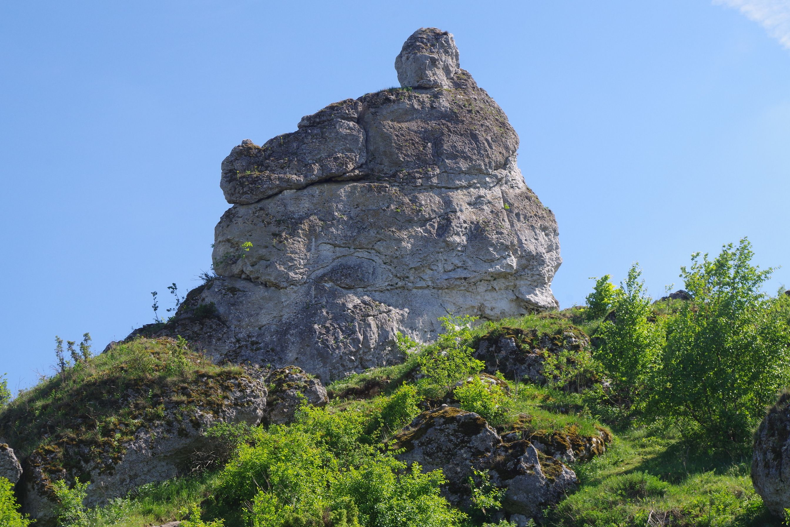 Skała Mnich w masywie Biakła koło Olsztyna